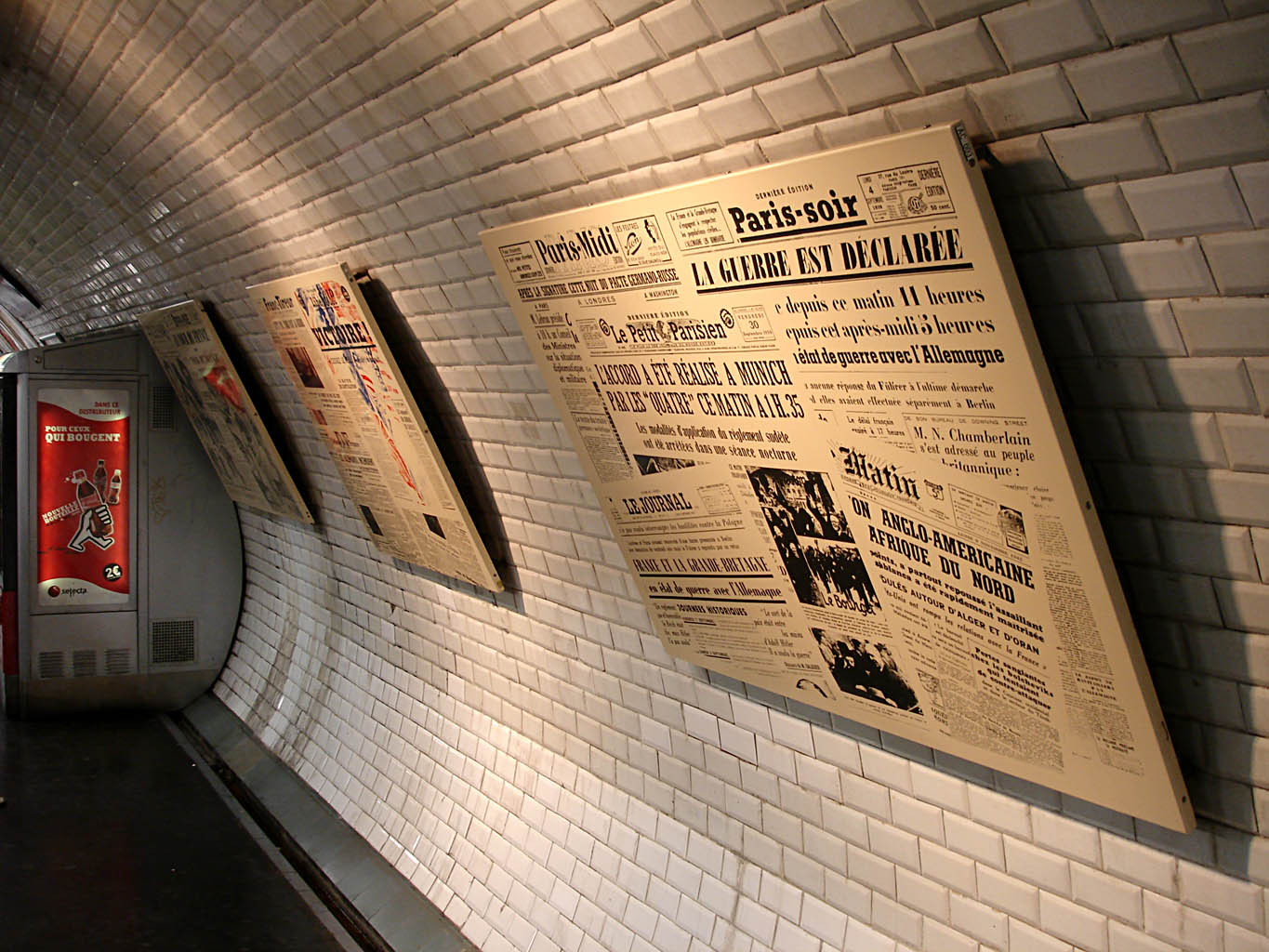 Panneaux à la station Réaumur - Sébastopol, de la ligne 3 du métro de Paris, France.